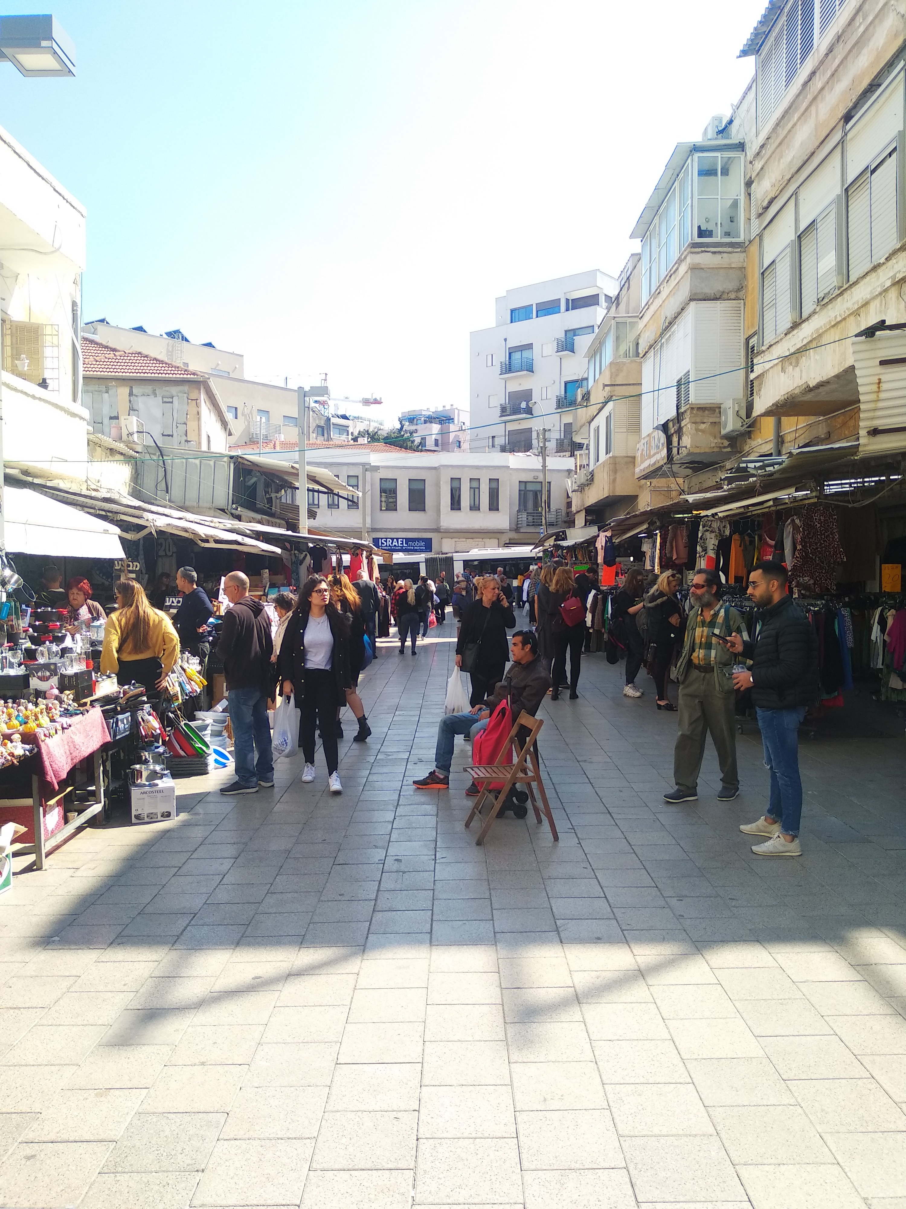 שוק בצלאל